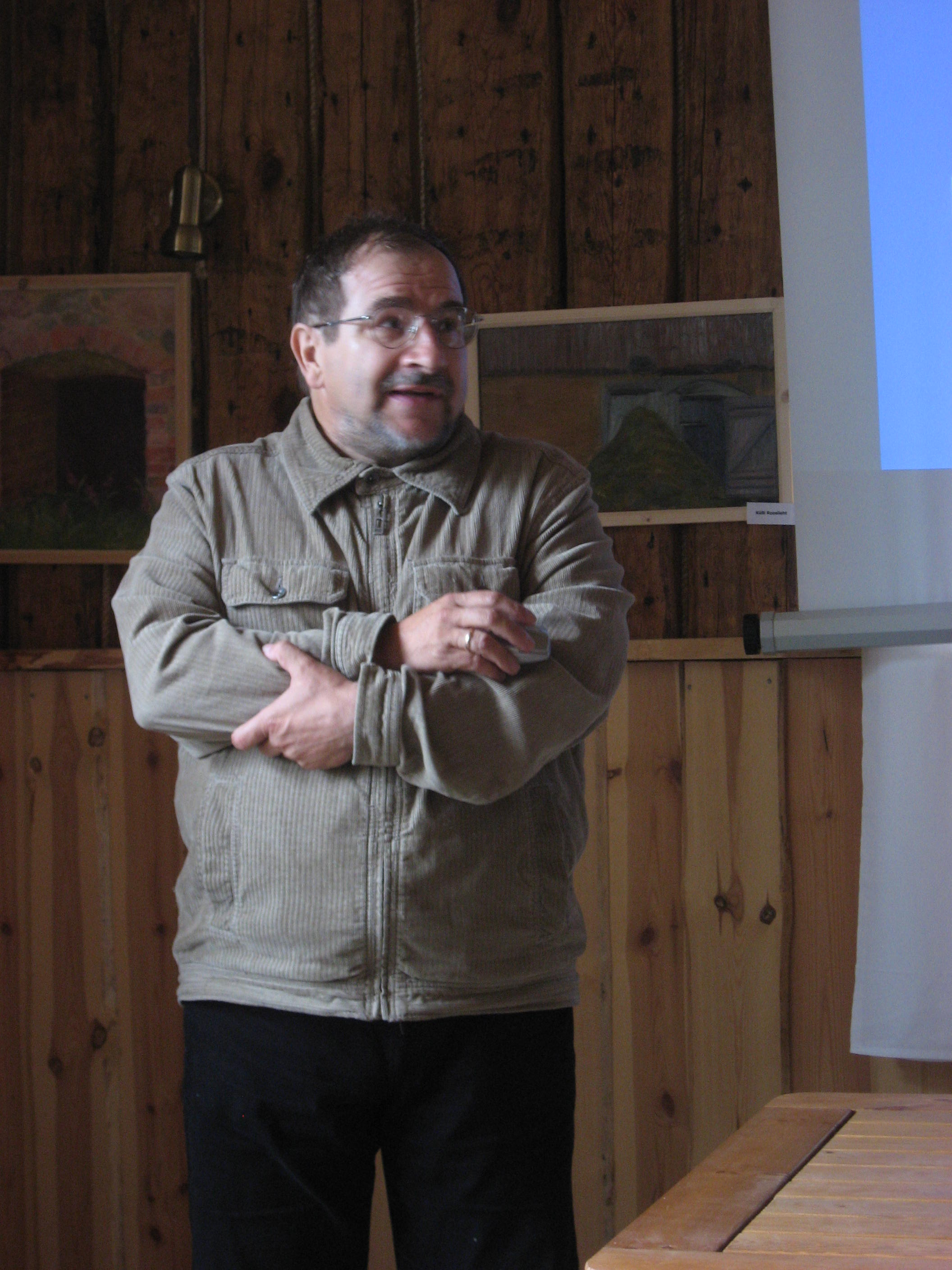 Enn Kasak esinemas Kaika suveülikoolis. Võro: Kasagu Enn tege Kaika suvõülikkolin Kaikal ettekannõt.